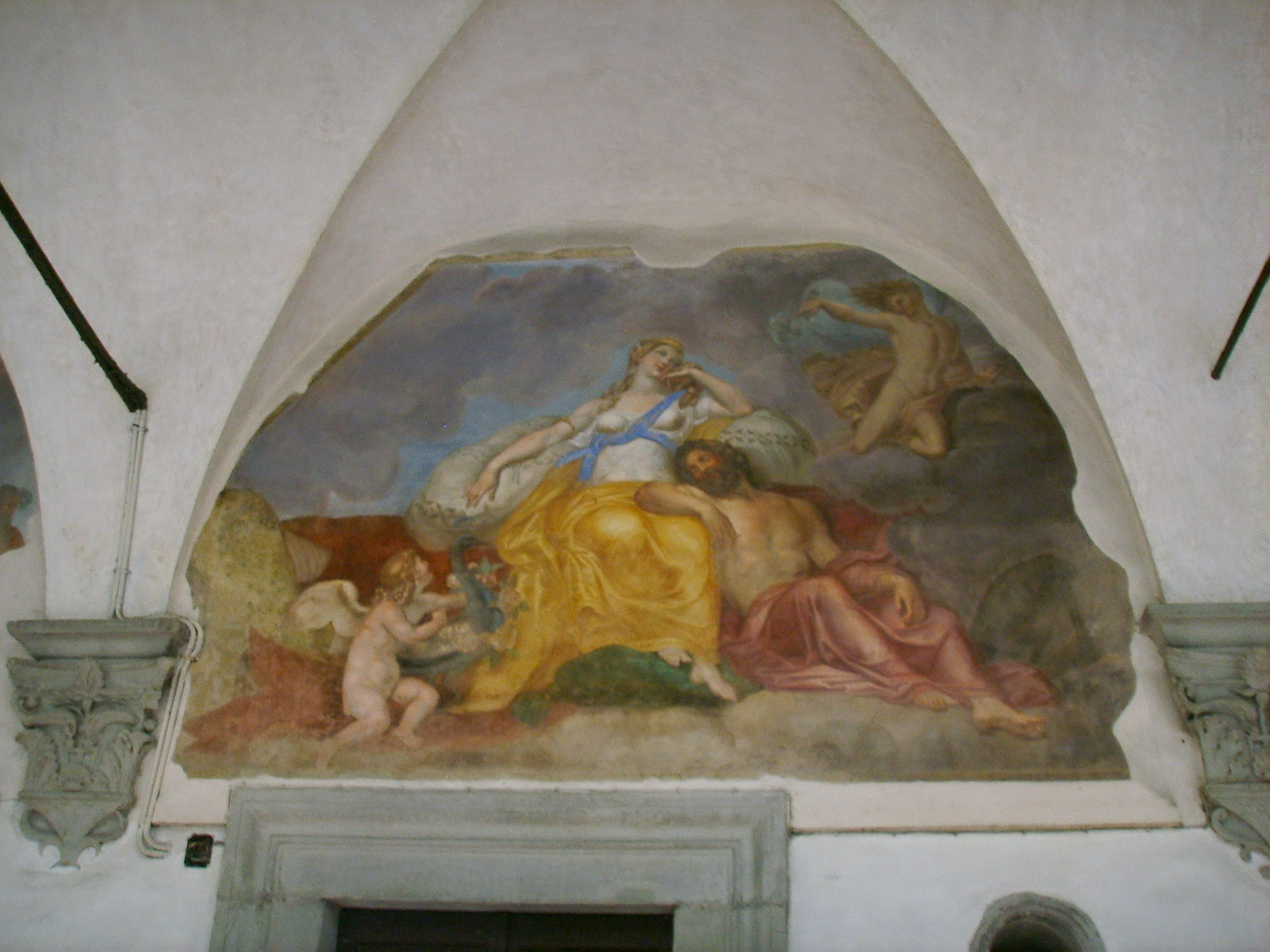 Palazzo corsini antinori, pitture cortile